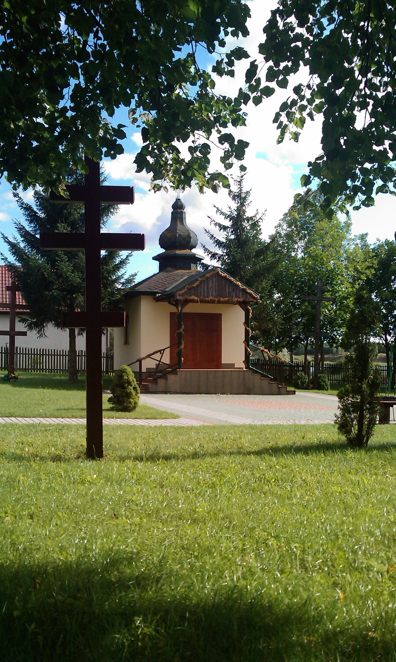 Cerkiew parafialna pod wezwaniem św. Apostołów Piotra i Pawła